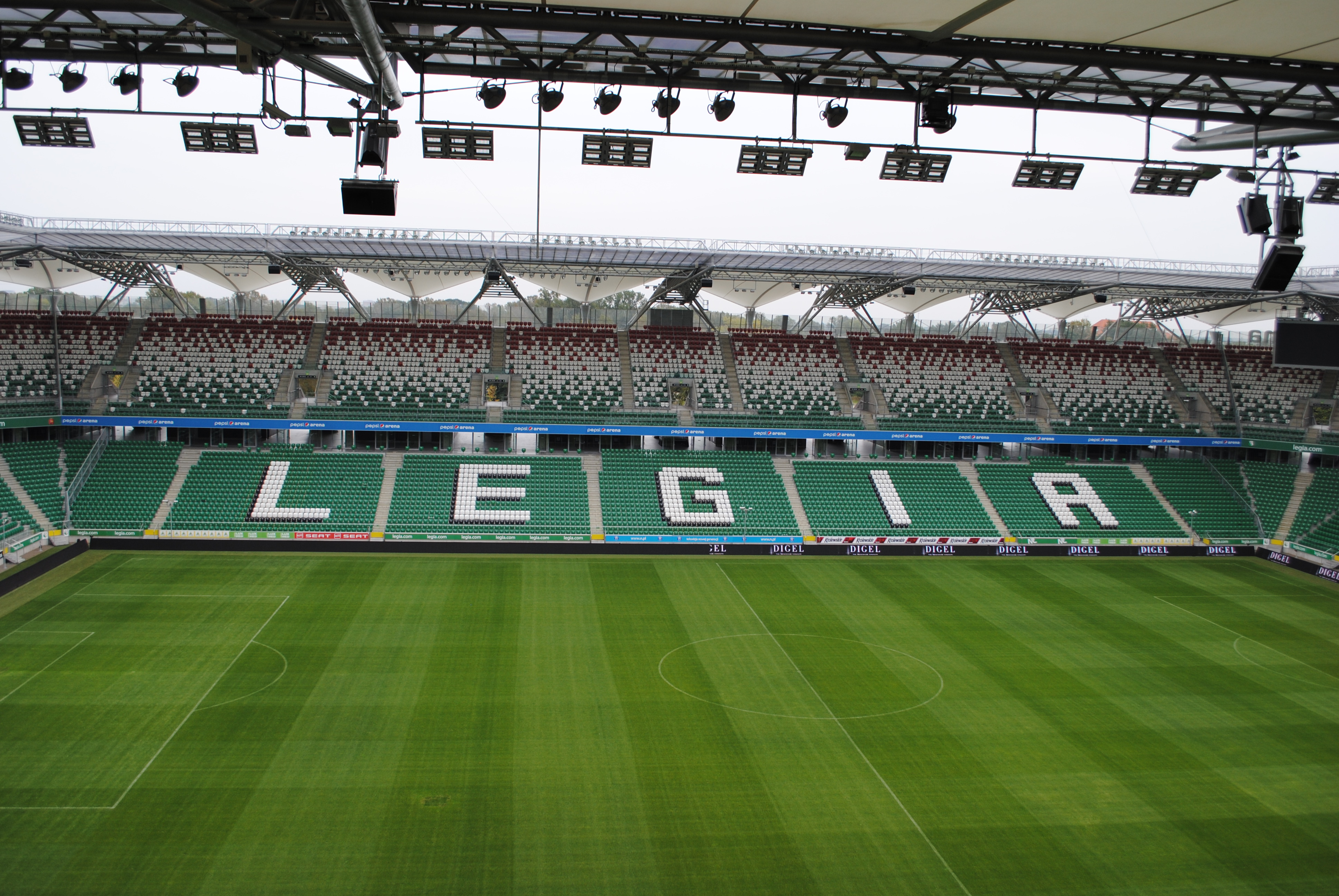 Stadion Legii Warszawa